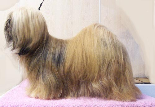 Lhasa Apso EL Minja's Aisha